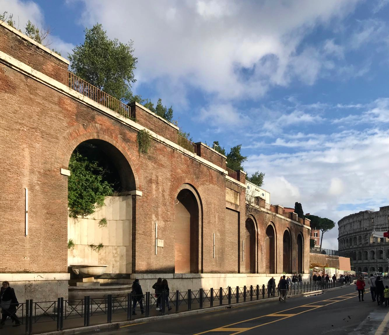 Muraglione in via dei Fori Imperiali